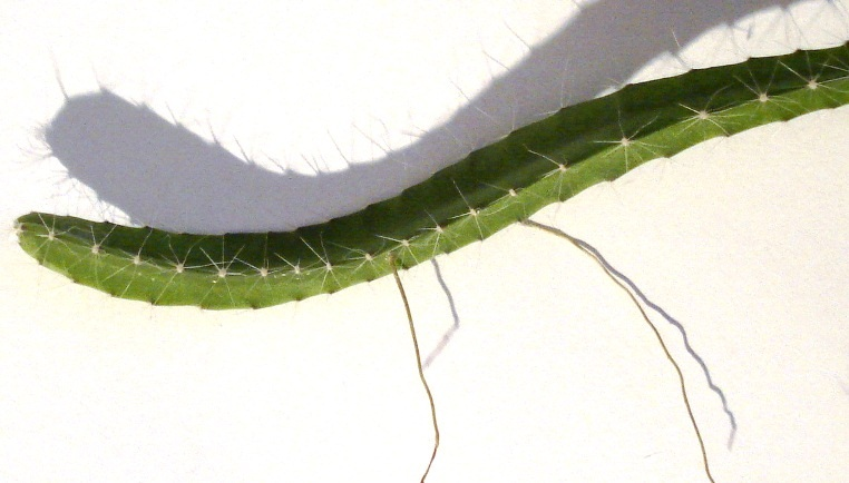 Trieb von Selenicereus megalanthus